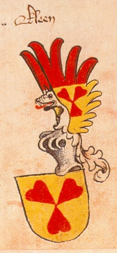 Ingeram-Codex der ehemaligen Bibliothek Cotta Cleen